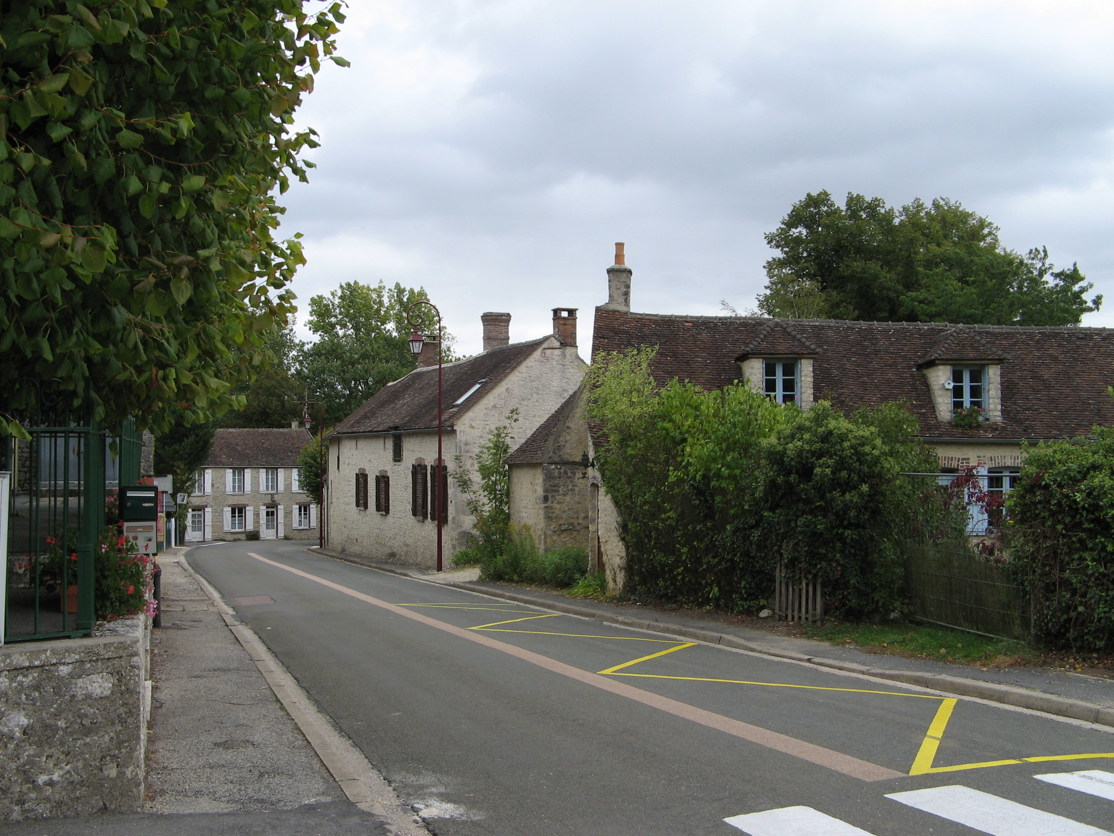 Rue devant la mairie de Paley, France.